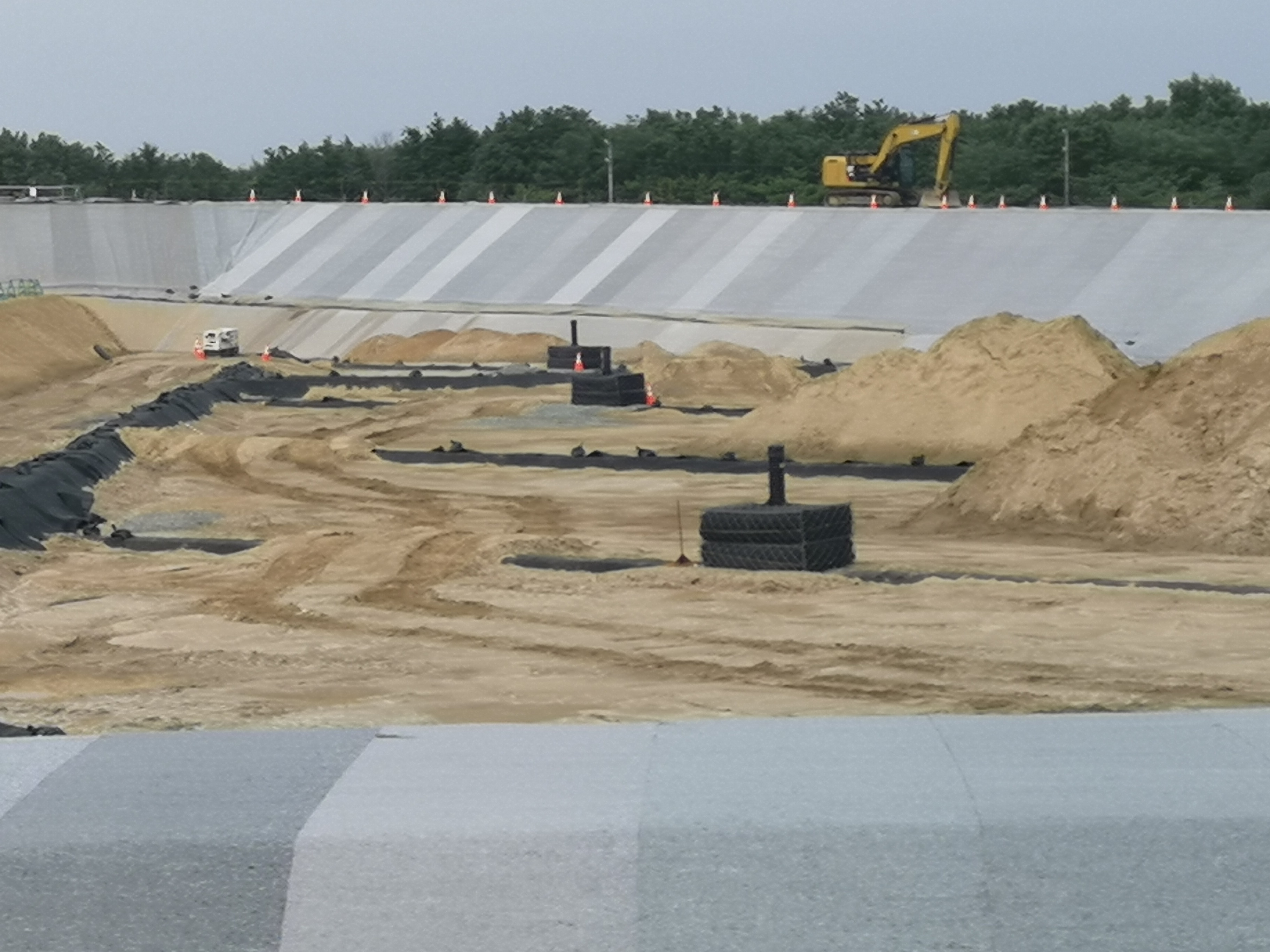 大熊町の中間貯蔵施設